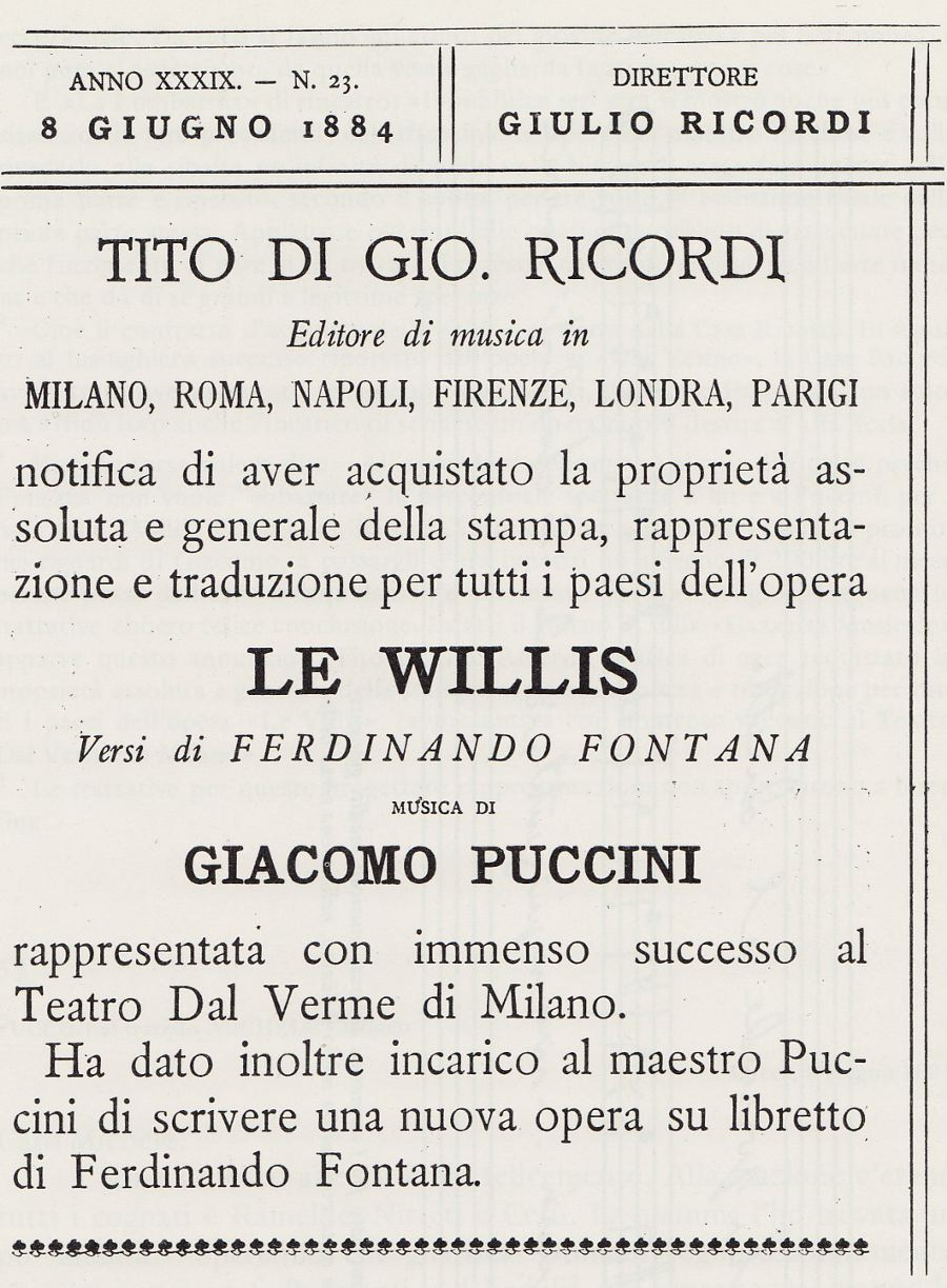 part of a page from "Gazzetta Musicale di Milano" (1884)